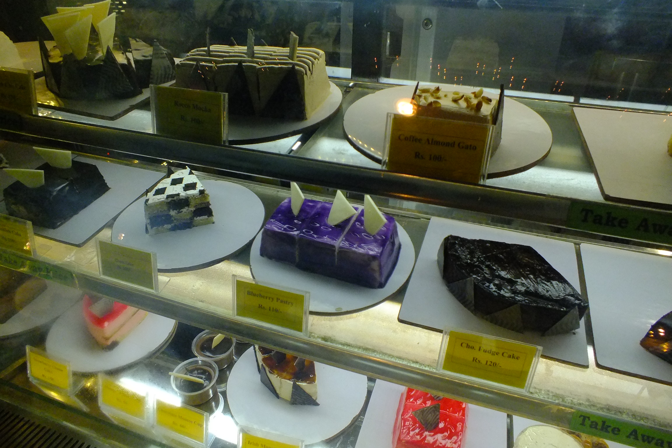 2015-03-09 Shortcake of Yin Yang Restaurant in Thamel, Kathmandu, Nepal